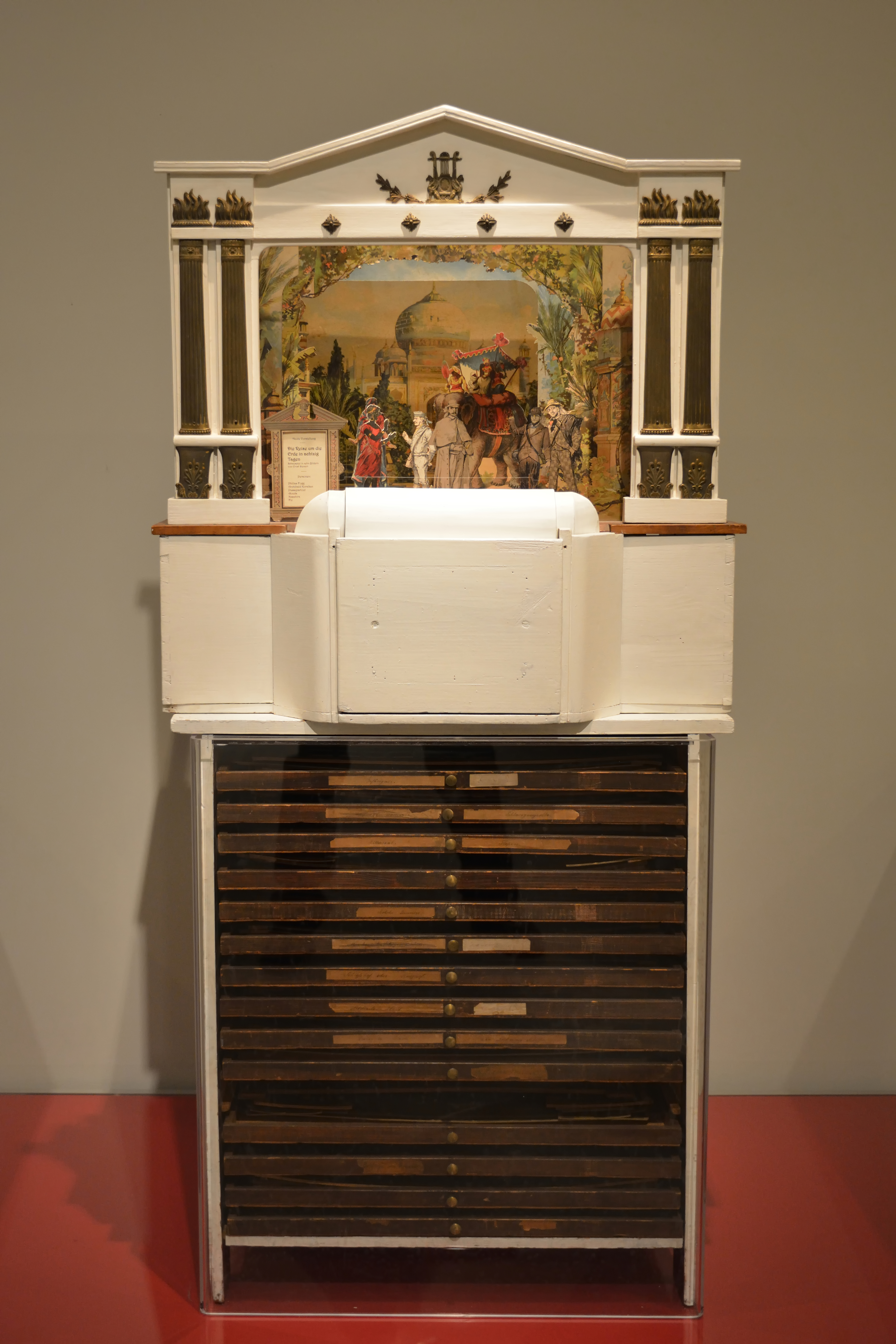 Impressionen aus dem Museum Europäischer Kulturen in Berlin.Ausstellungsstück: Papiertheater: Reise um die Erde in 80 Tagen[1]